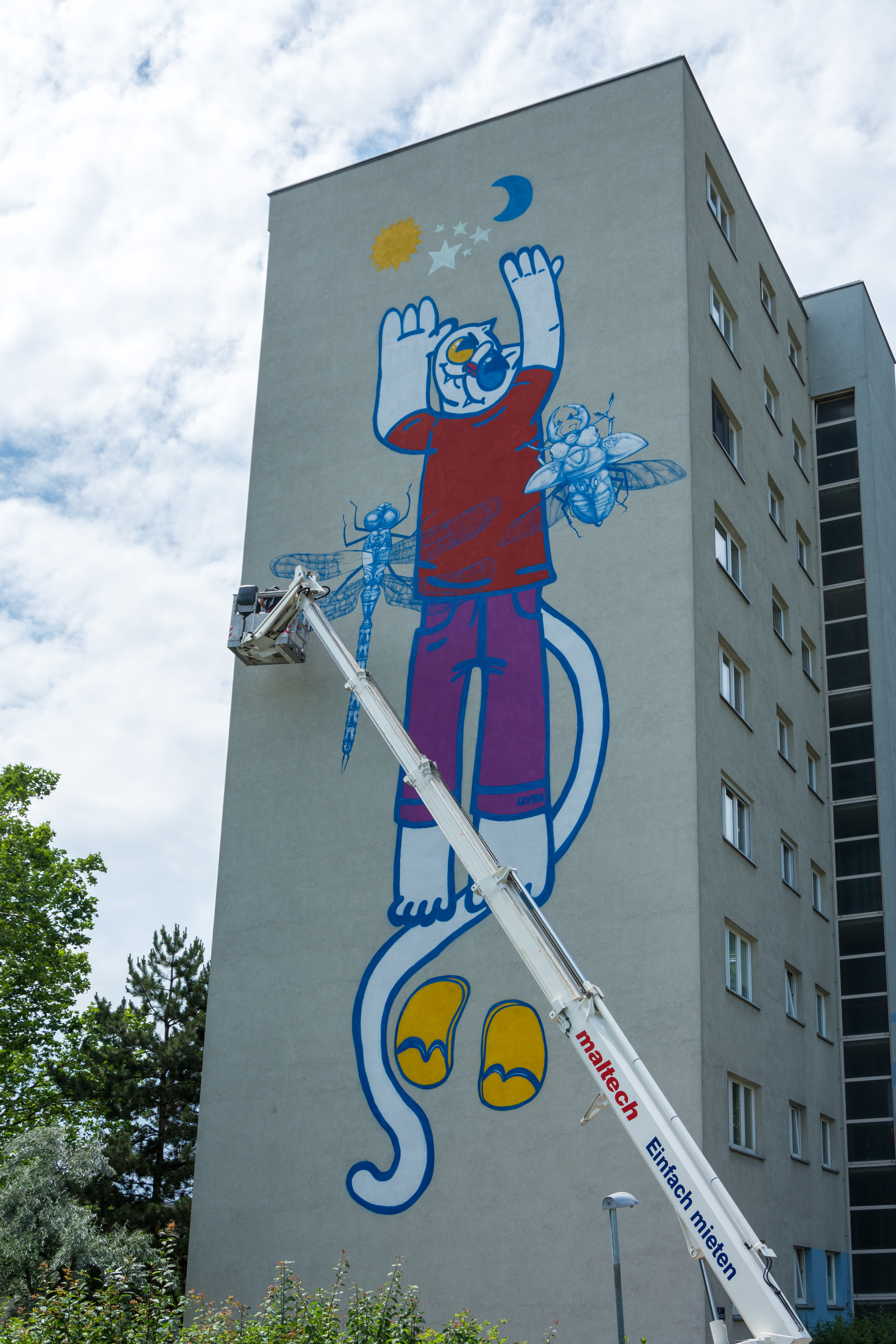 Graffiti an Per Albin Hansson Siedlung Ost, Stiege 13. Lunar(HR), Smack(HR), Ruin(AT).